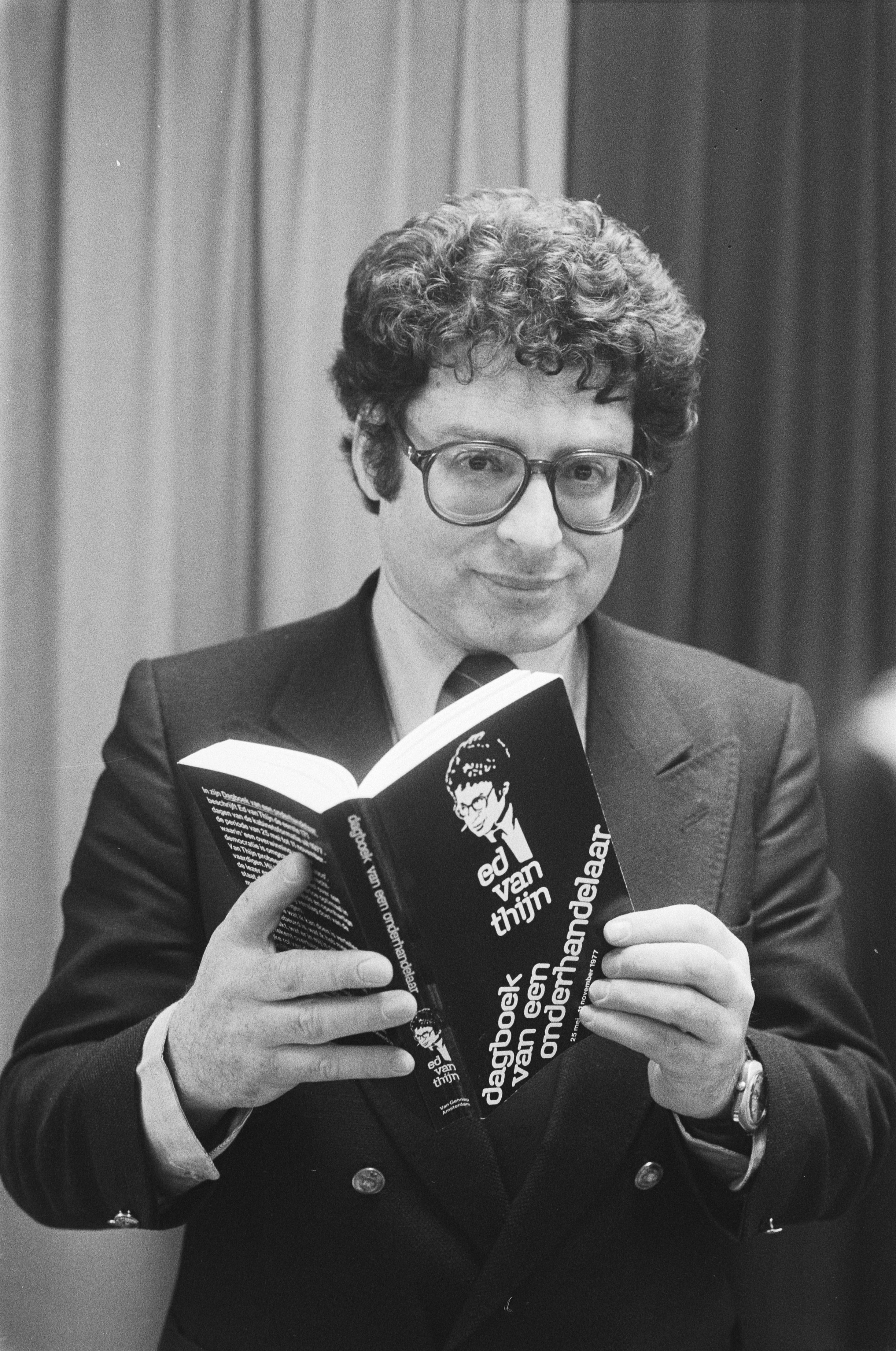 Collectie / Archief : Fotocollectie Anefo Reportage / Serie : [ onbekend ] Beschrijving : Ed van Thijn presenteert "Dagboek van een onderhandelaar", verslag van kabinetsformatie Datum : 16 februari 1978 Trefwoorden : boeken, publicaties Persoonsnaam : Thijn, Ed van Fotograaf : Verhoeff, Bert / Anefo Auteursrechthebbende : Nationaal Archief Materiaalsoort : Negatief (zwart/wit) Nummer archiefinventaris : bekijk toegang 2.24.01.05 Bestanddeelnummer : 929-5777